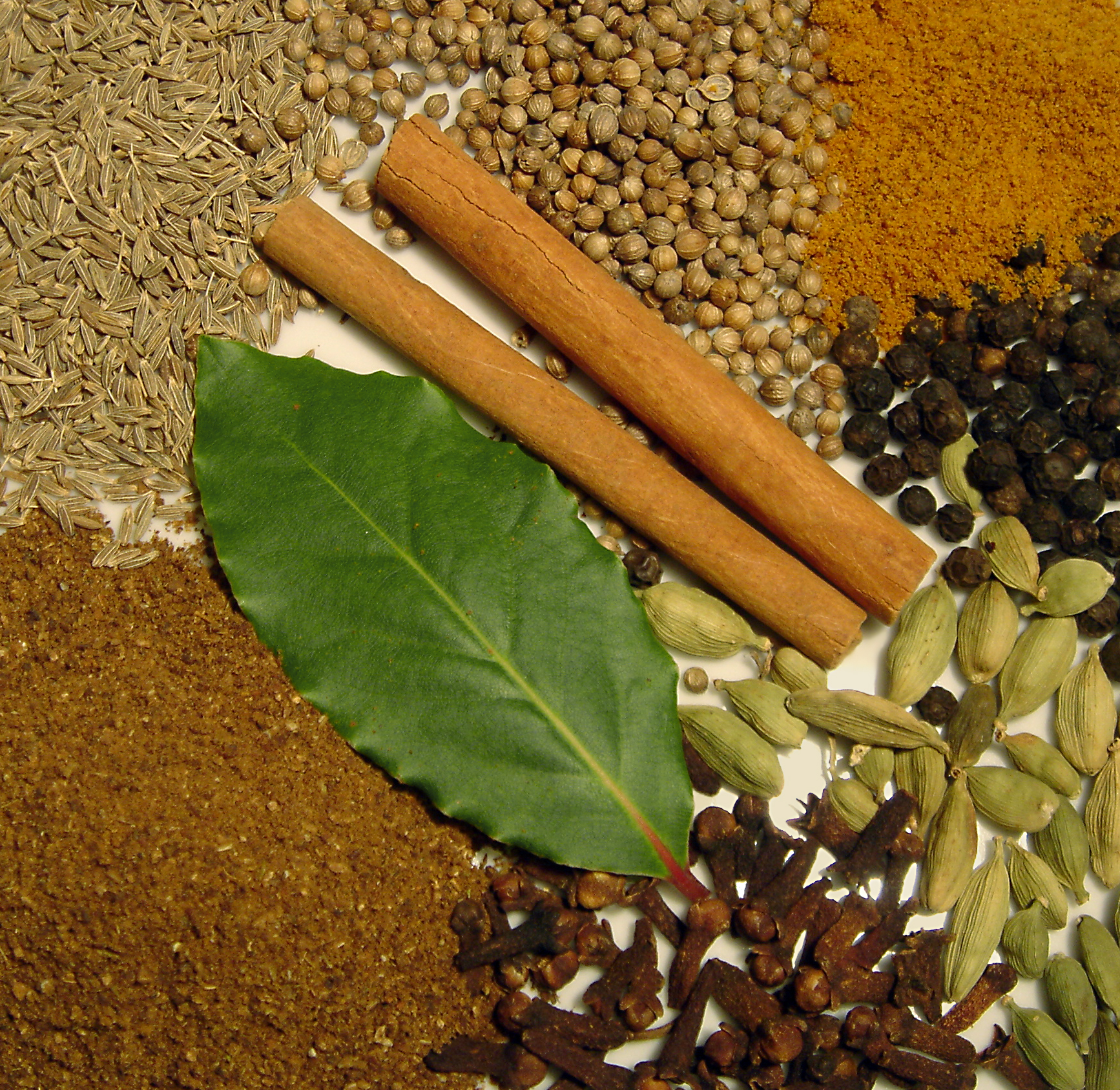 Spice mixture Indian Garam Masala